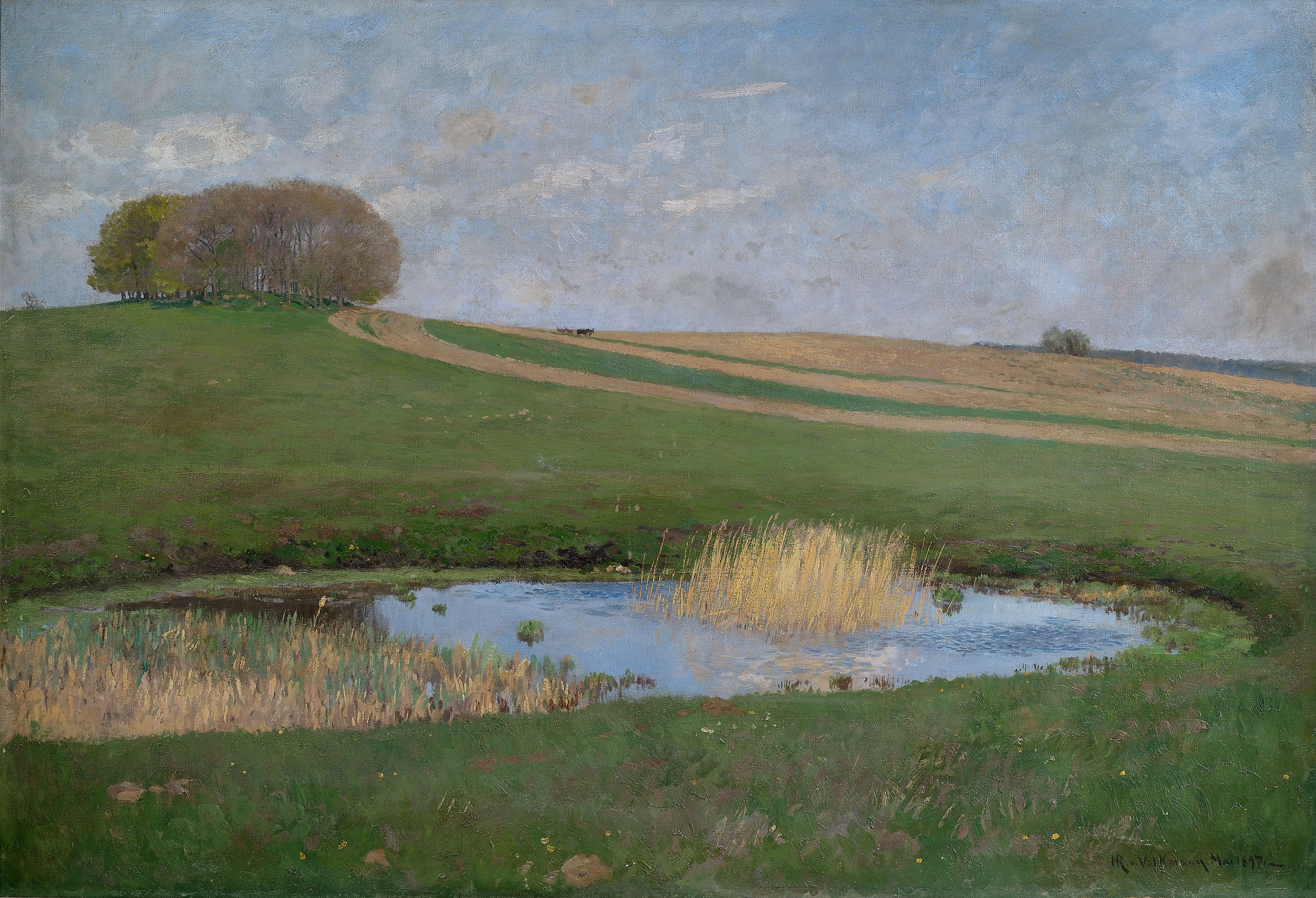 Sommerlandschaft mit einem Tümpel. Öl auf Leinwand, unten rechts signiert und datiert Mai 1897. 65 x 95 cm